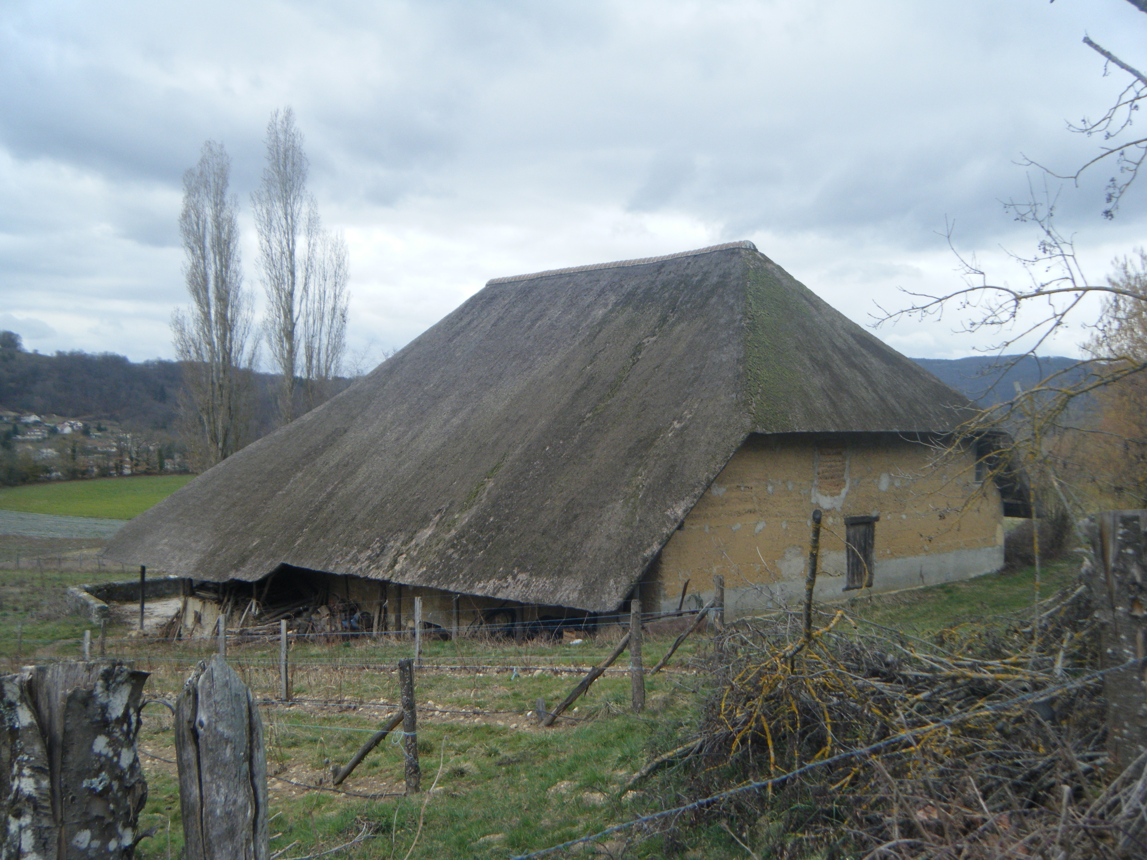 La grange de Louisias vue de la route de Chirens en mars 2015